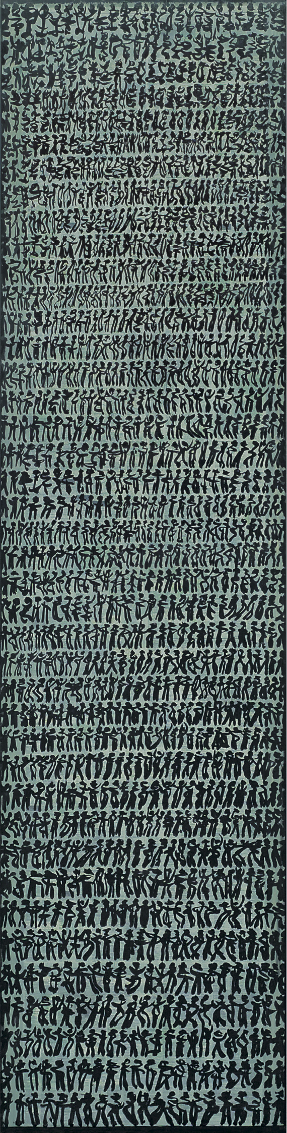 Alfons Bürgler: Körperschriften. 1999. Tusche auf Papier auf Holz. 197 cm x 50cm